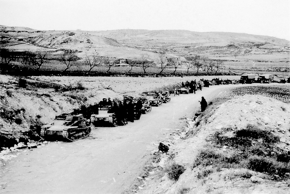 C/16. Santa Coloma de Queralt (Tarragona). Tanques "Bolille" en la carretera.